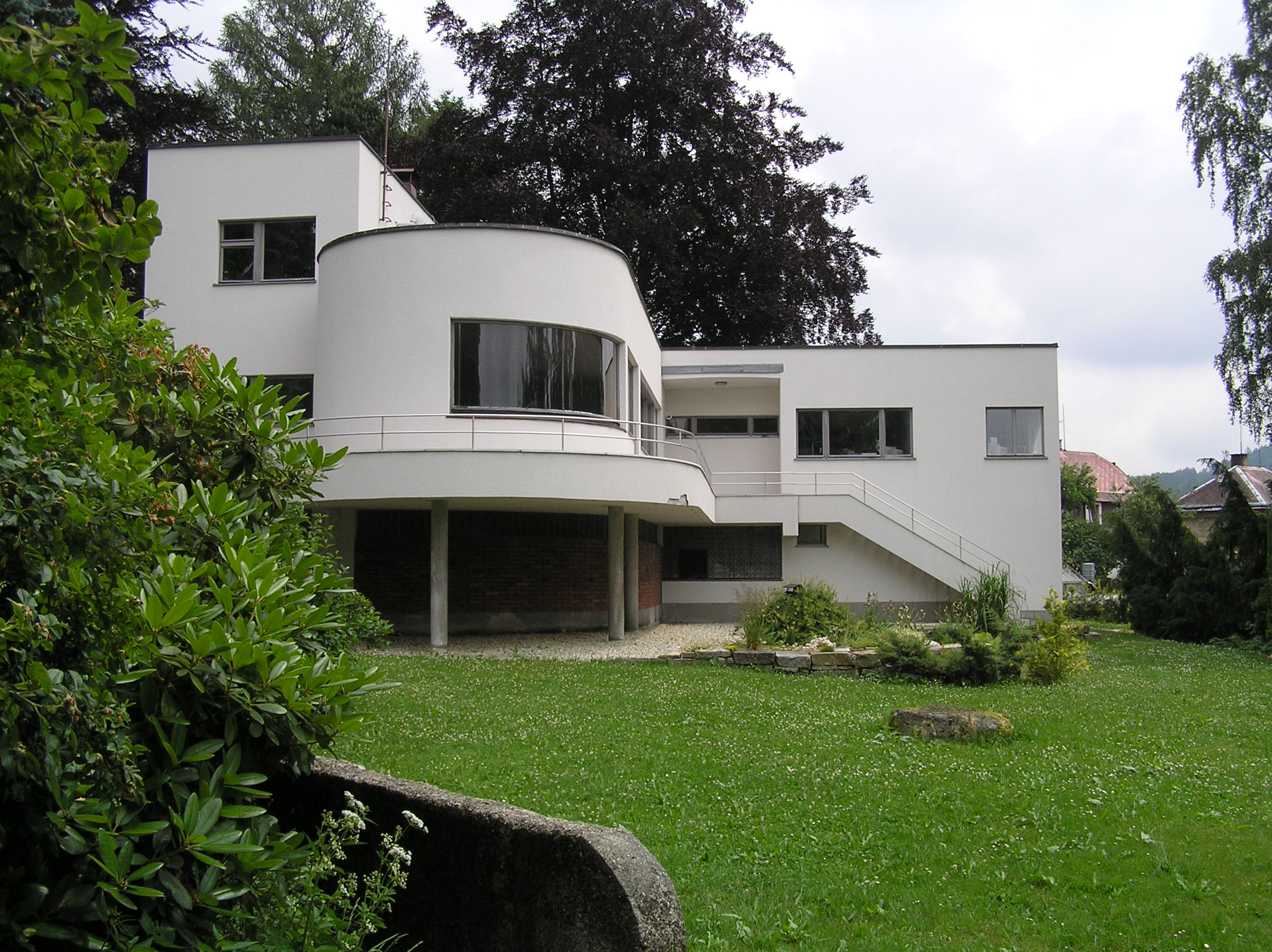 Háskova vila, Průběžná 449/10, Jablonecké Paseky.